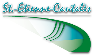 Logo de Saint-Etienne-Cantalès, Cantal, Auvergne, France